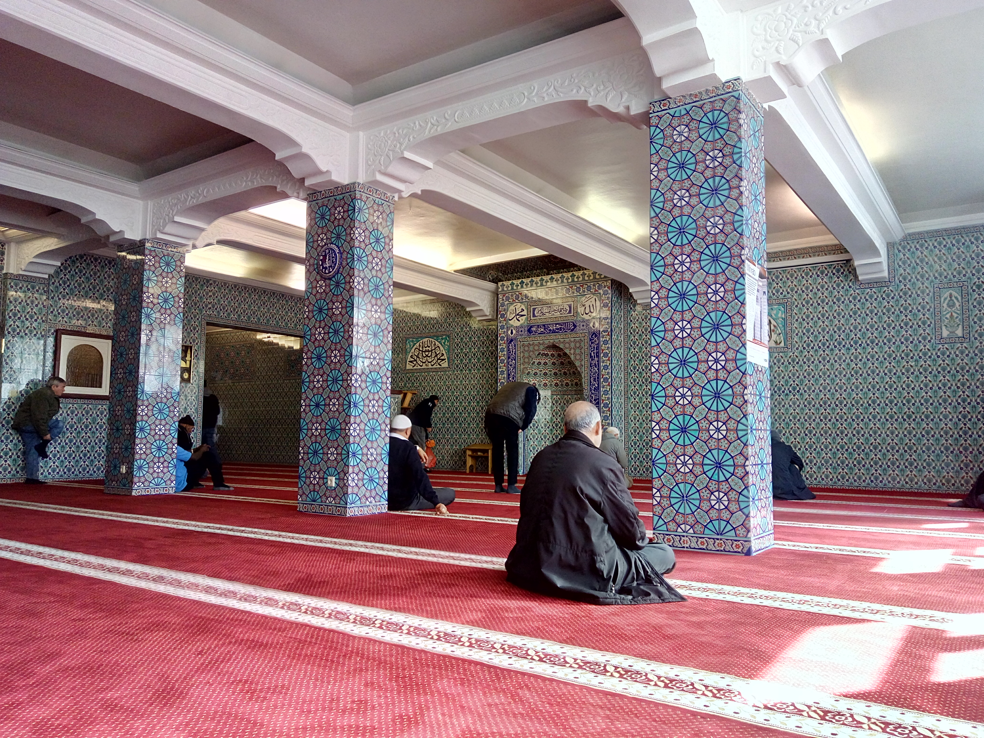 Der Gebetsraum der Männer in der Hamburger Centrums-Moschee.